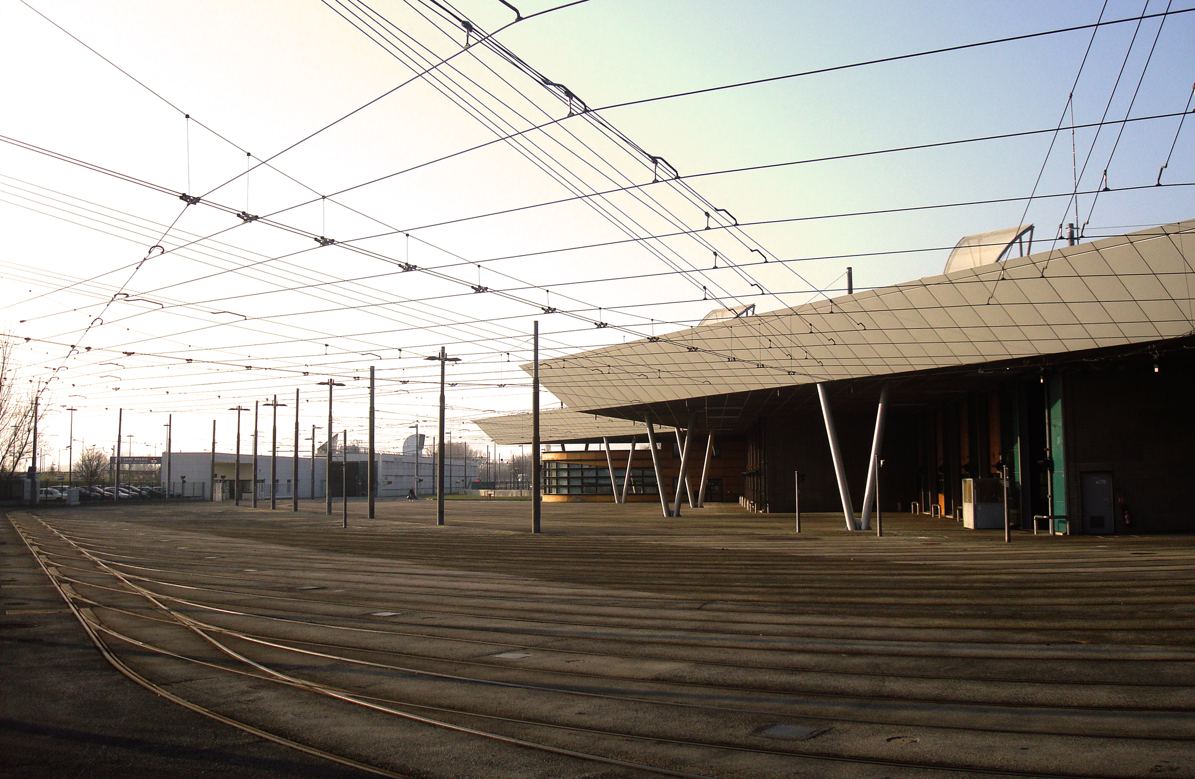 Vue du centre de maintenance des tramways de Saint Priest depuis la station Porte des Alpes.